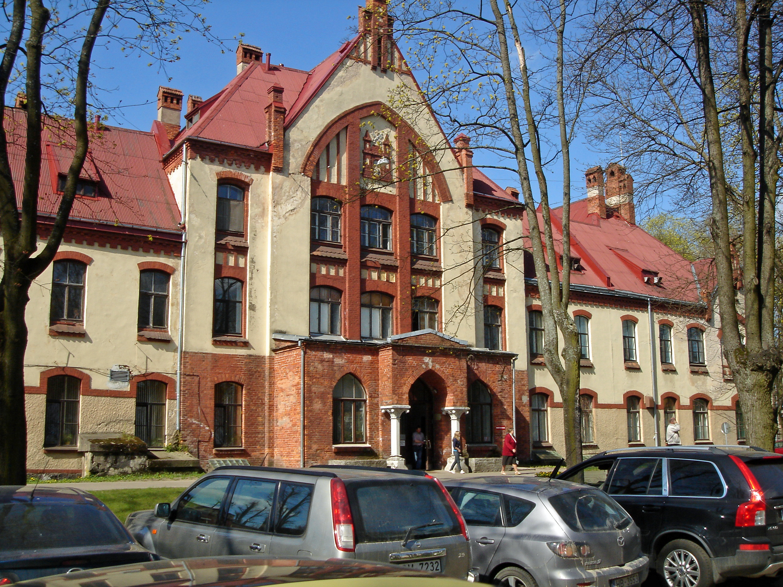 Hospital (J.Stradina) entrance